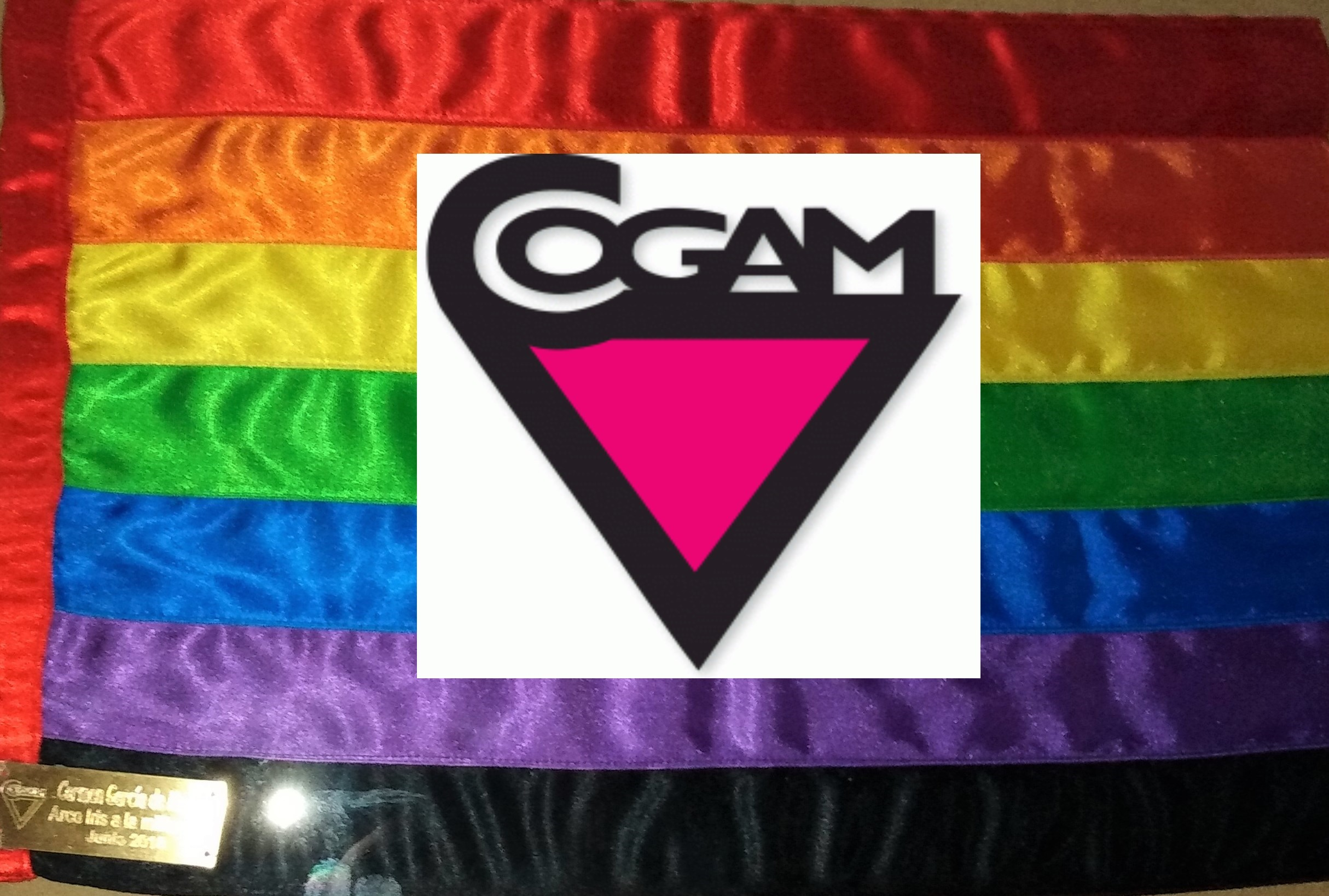 Premios 2018